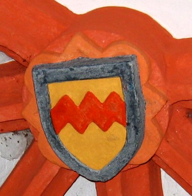 Michaelskapelle Taben-Rodt. Den Schlussstein des Kreuzgewölbes ziert das Wappen derer von Manderscheid, die zur Zeit des Bau der Kapelle eine herrschende Stellung in der Region innehatten.